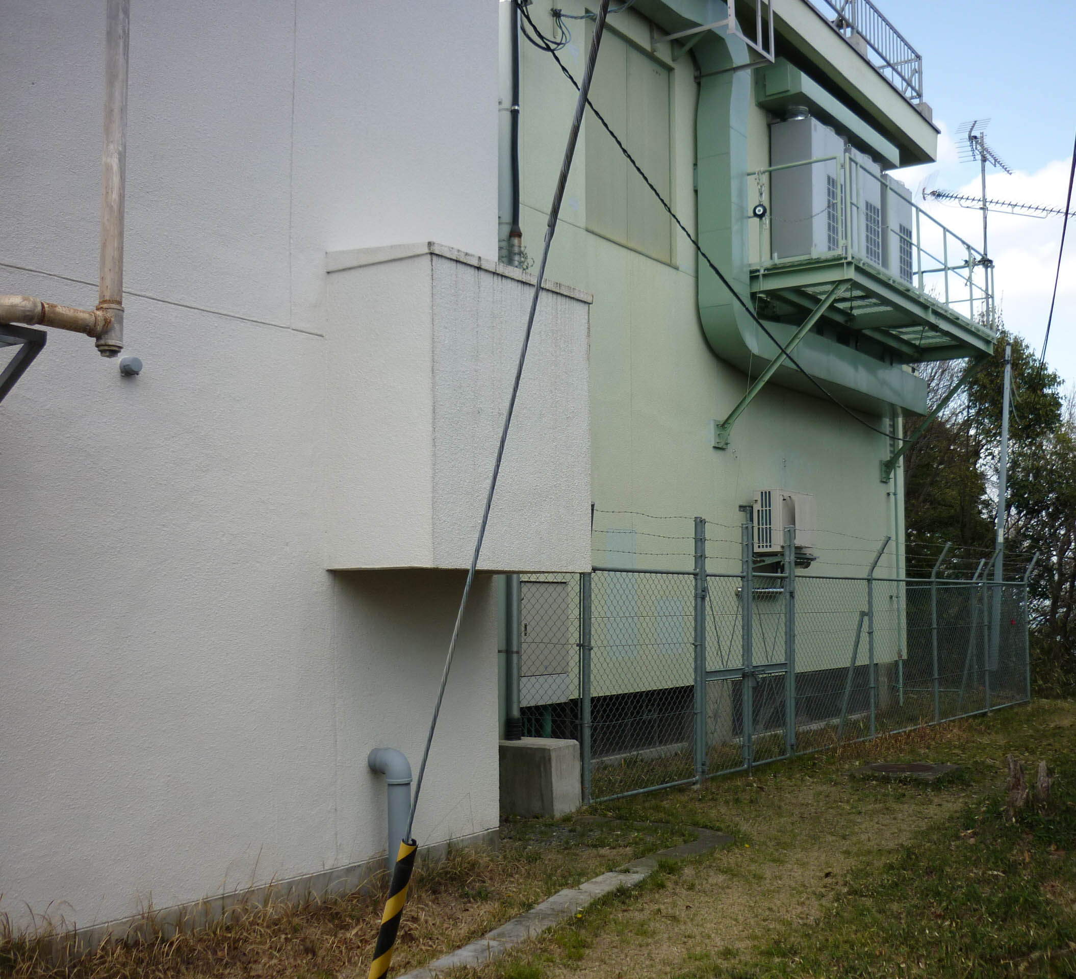 電波塔施設